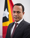 Abel Pires da Silva, Abgeordneter des Nationalparlaments Osttimors